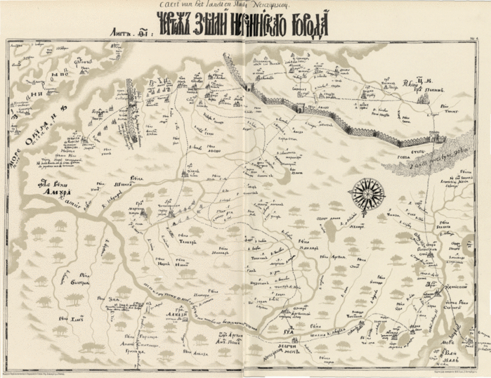 Map of the Far East of Russia, 1701